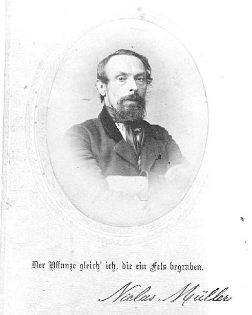 Nikals Mueller, German Poet and Printer (1809-1087)